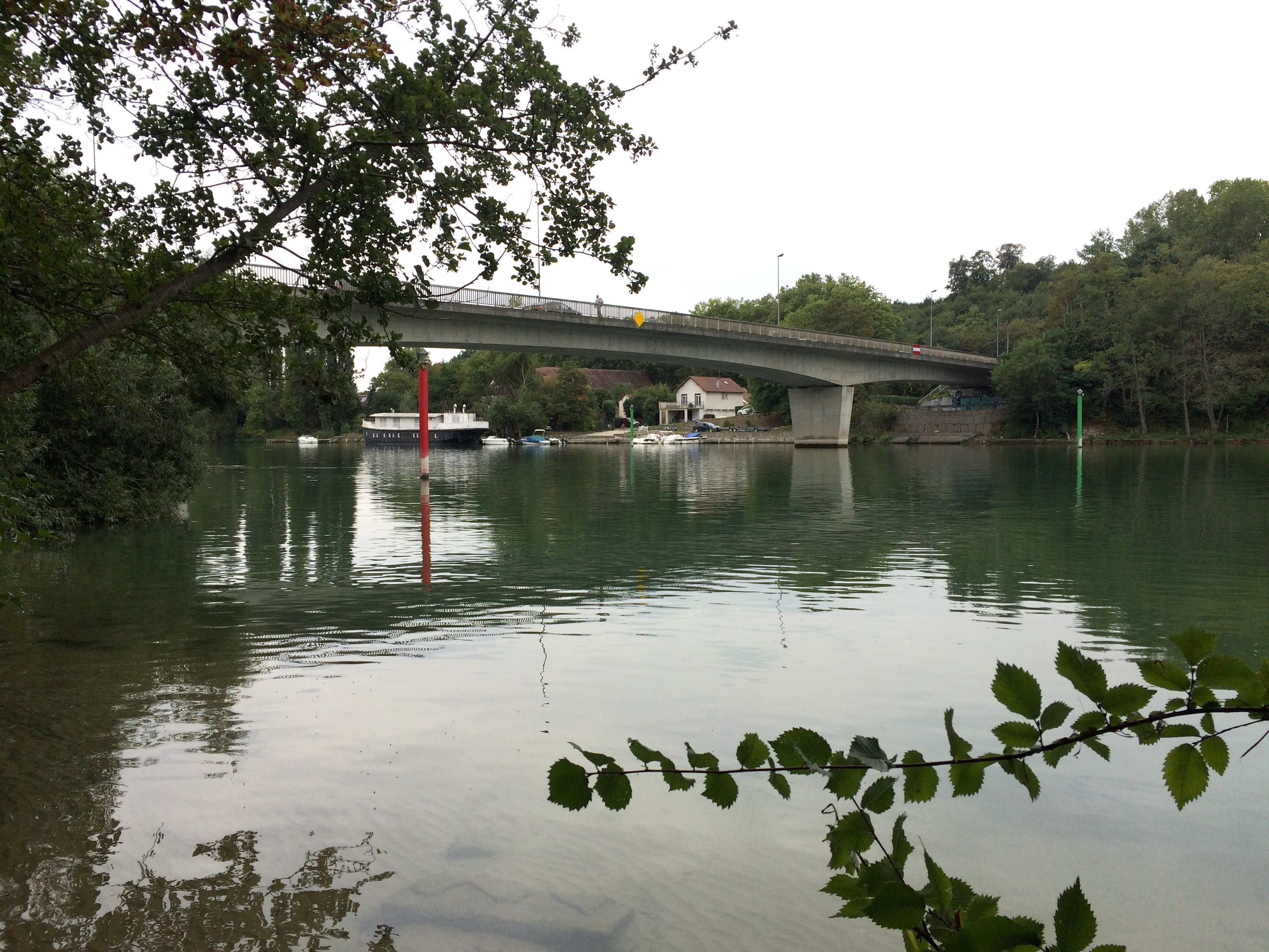 Pont de Samoreau, en 2018